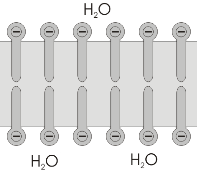 Doppelschicht einer Seifenlösung